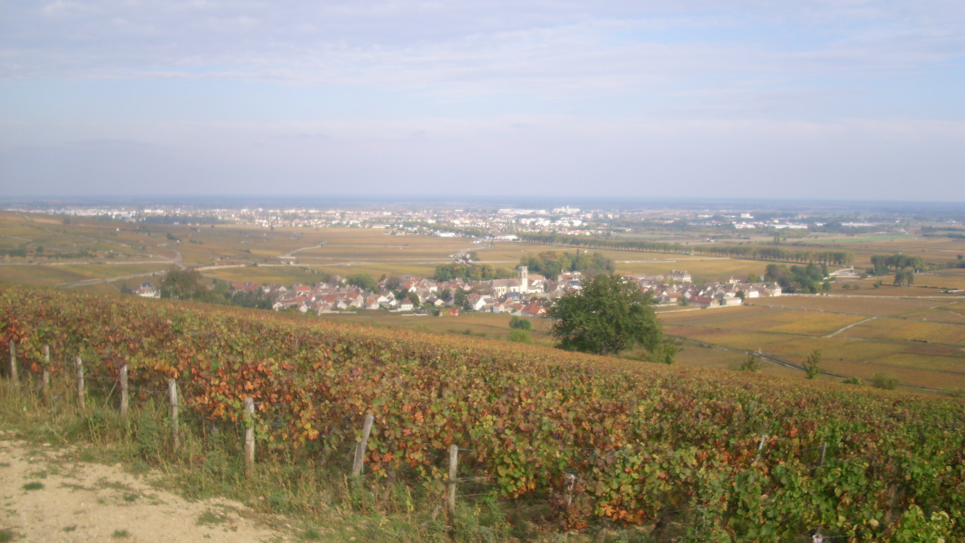 Vue au premier plan du village de Pommard avec derière la ville de Beaune (21)